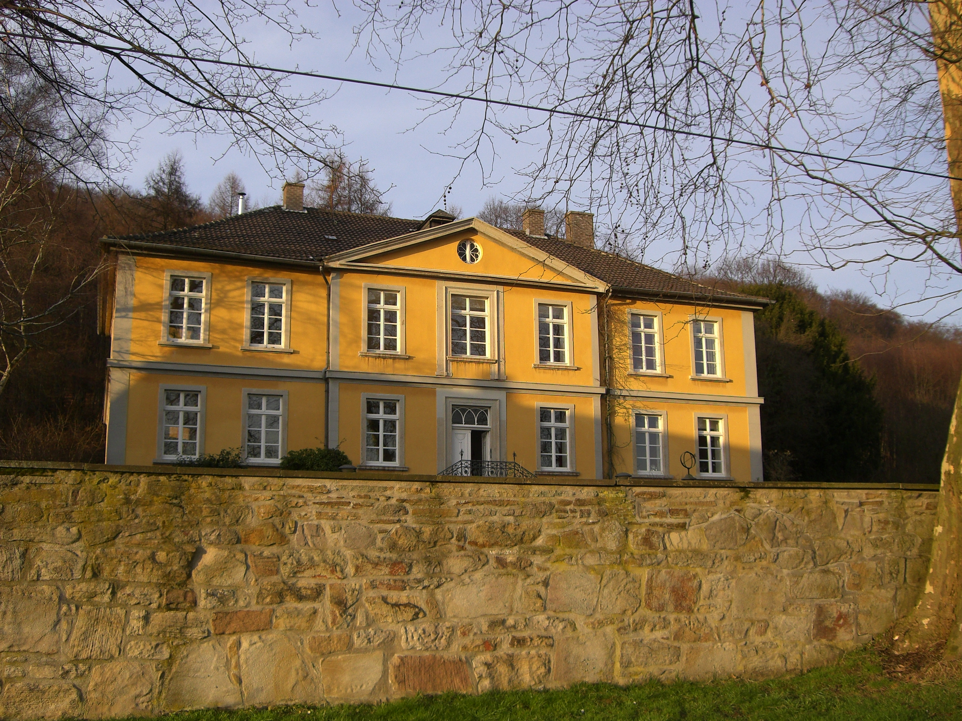 Haus Husen, Dortmund Denkmalschutz Dortmund, Syburg Gutshaus Husen